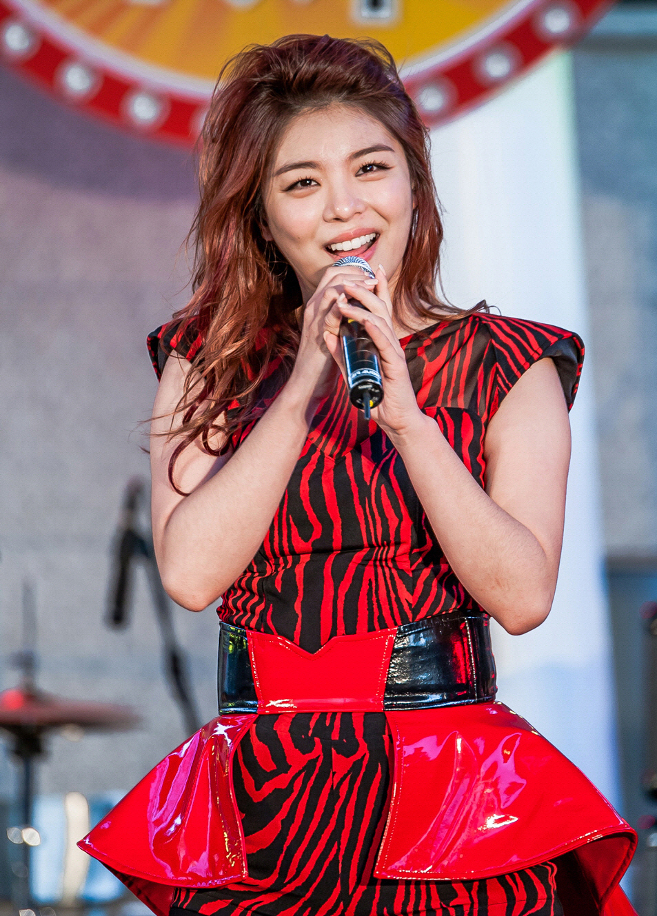 131011 진로콘서트 '포텐터지다' 에일리 by.달덩이.